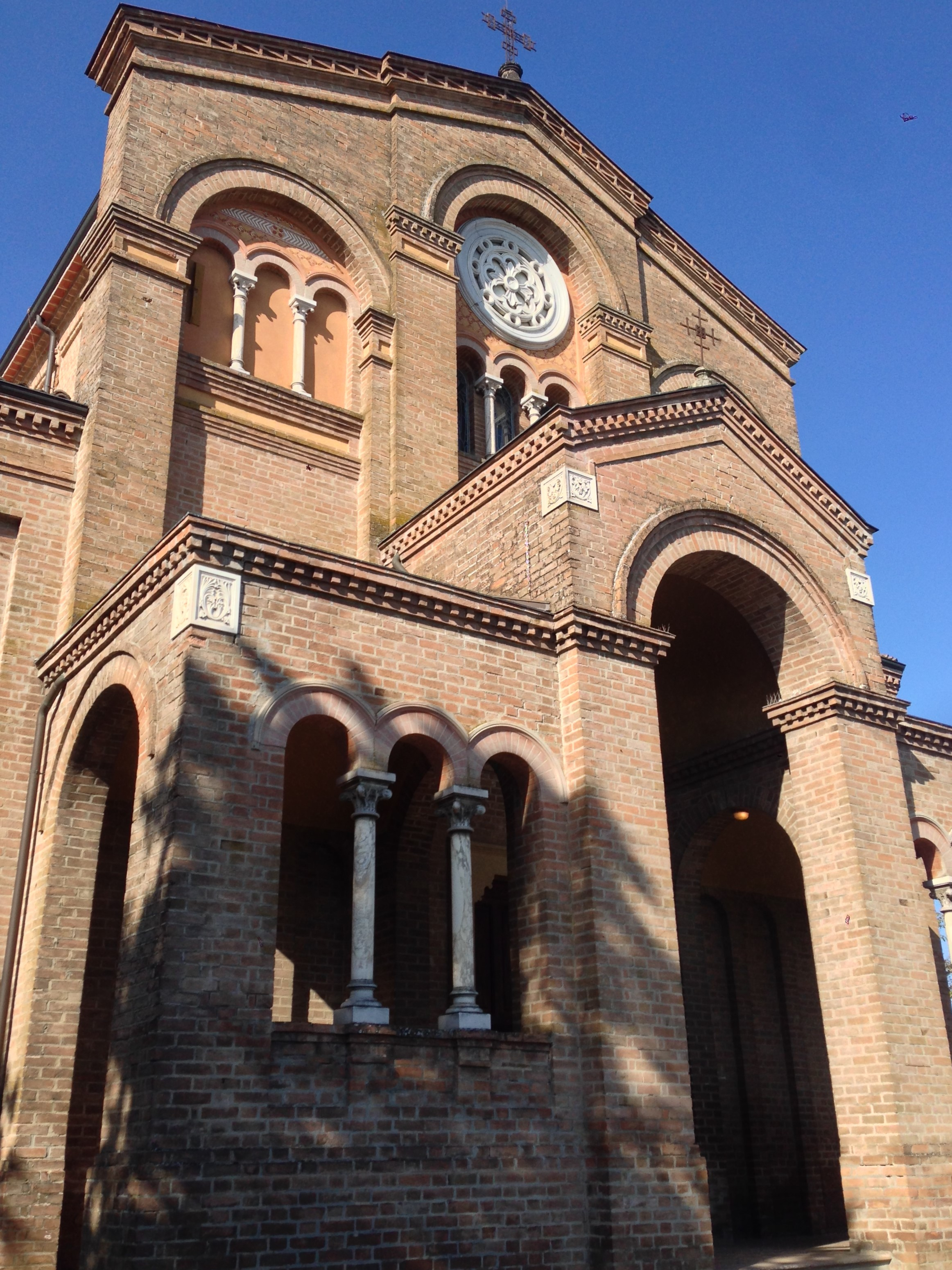 Iglesia en Costa Mezzana